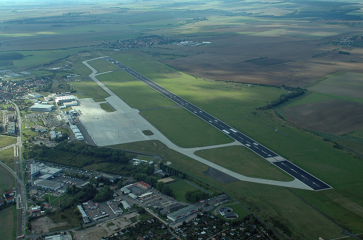 Luftbild vom Flughafen Erfurt aus Richtung Osten